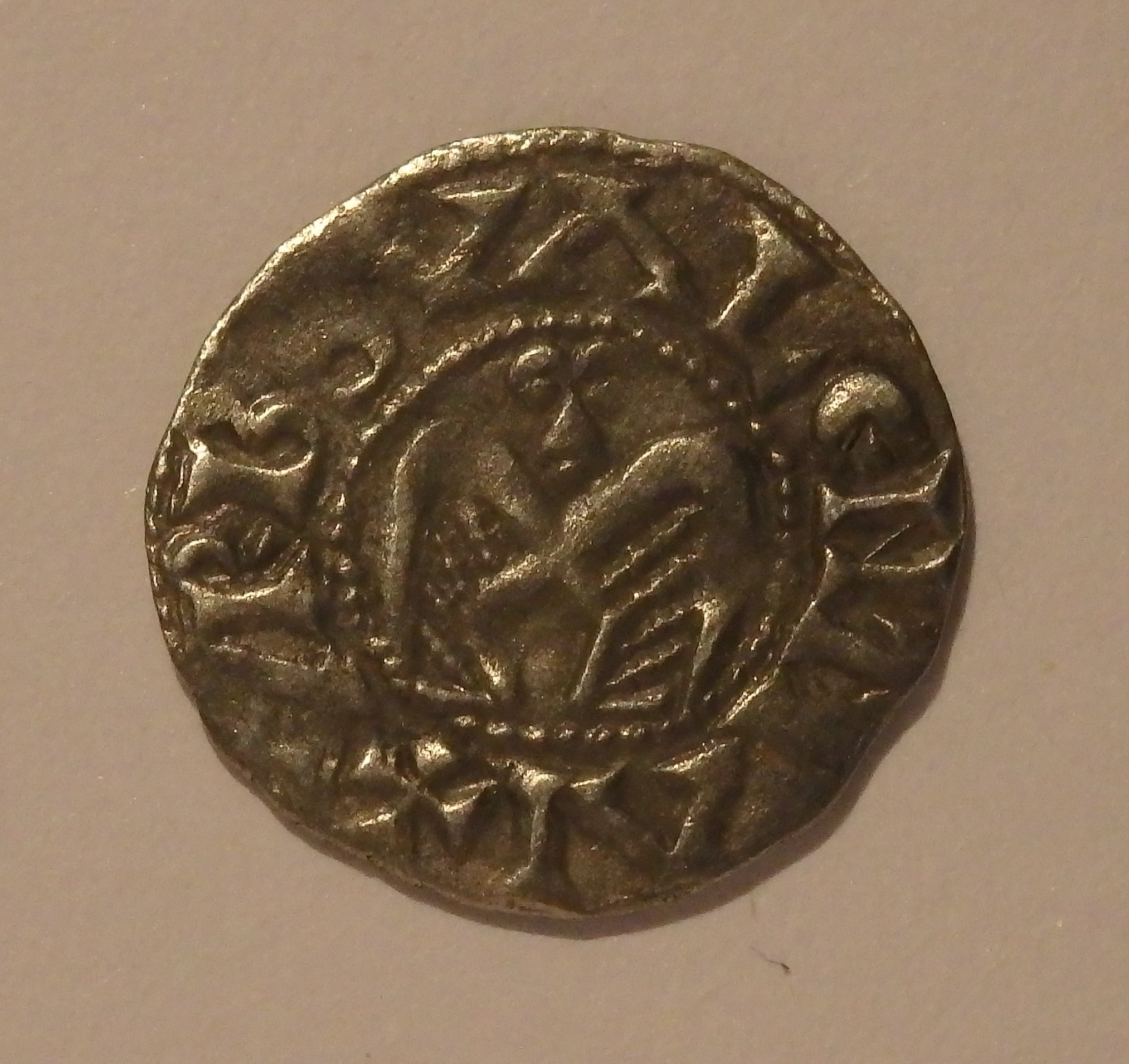 Rückseite des Denars, Engelsflügel über Heil. Apollinarius